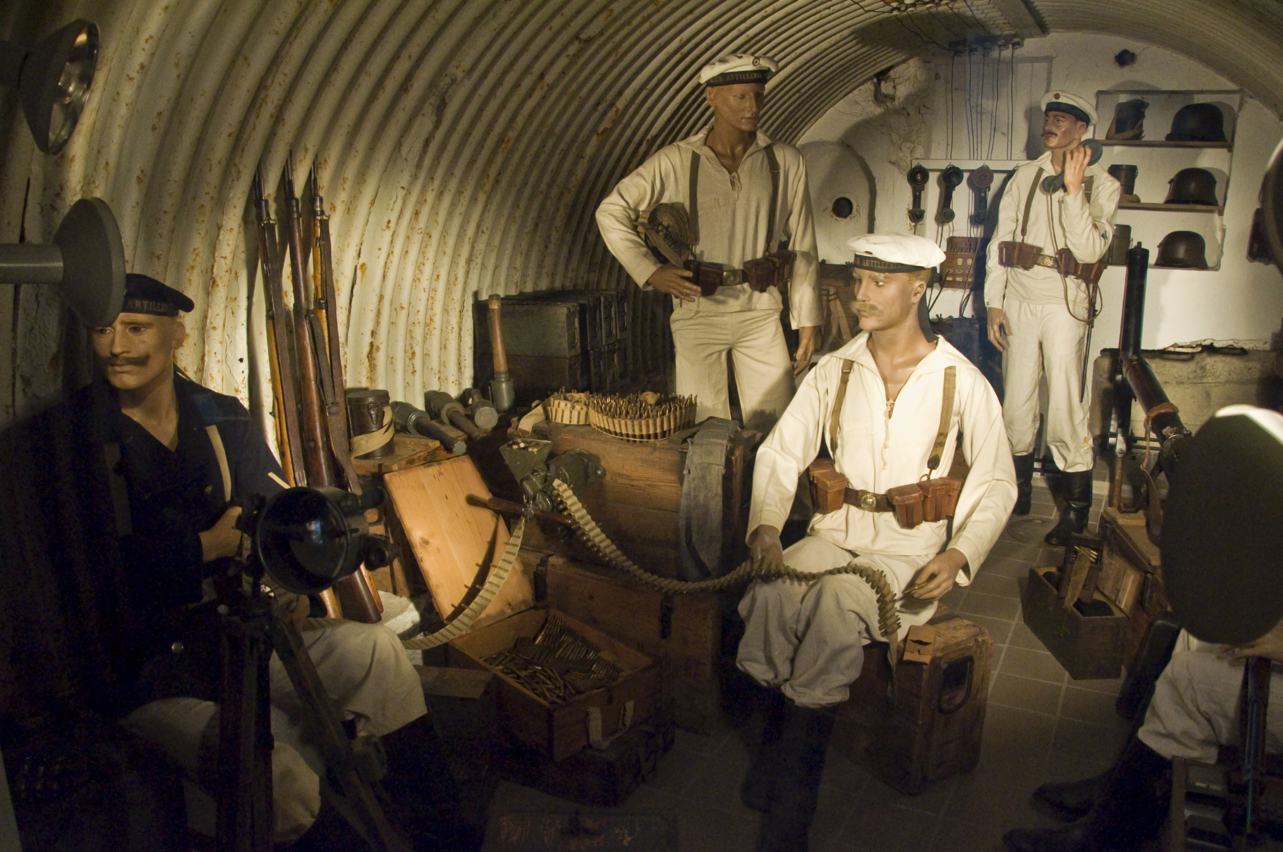 Een bomvrije schuilpaats van de batterij Aachen uit 1916, in het Openluchtmuseum Atlantikwall te raversijde, oostende, België